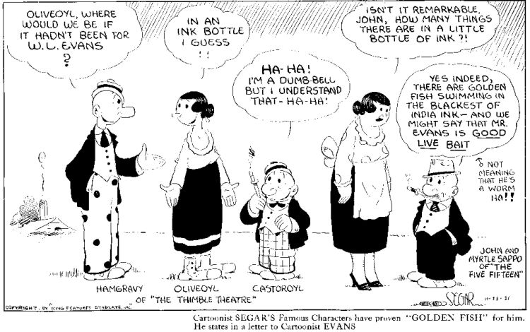 Dessin réalisé par E.C. Segar pour vanter les cours de son ancien professeur W. L. Evans.